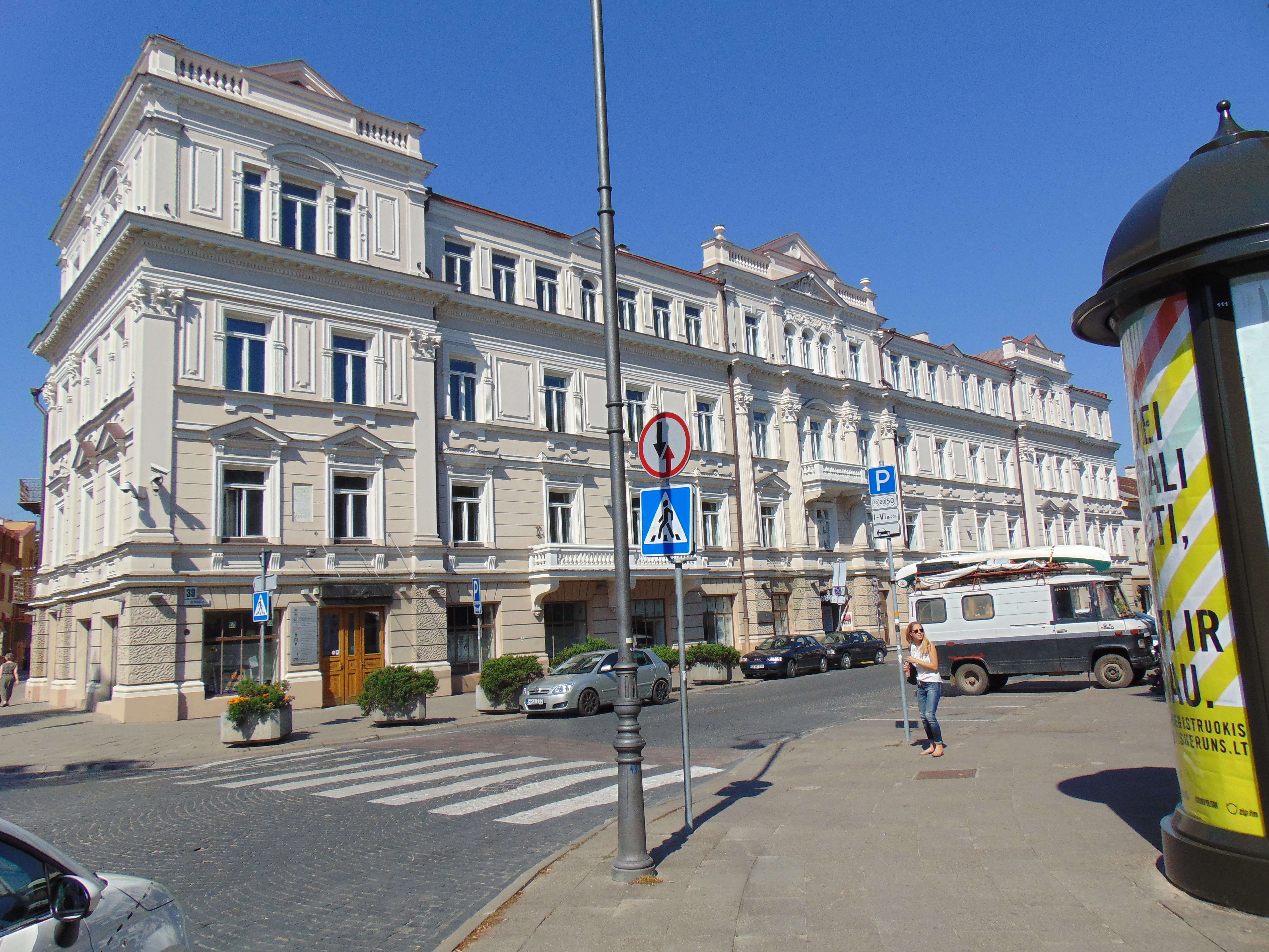 Vilniaus mokytojų namai